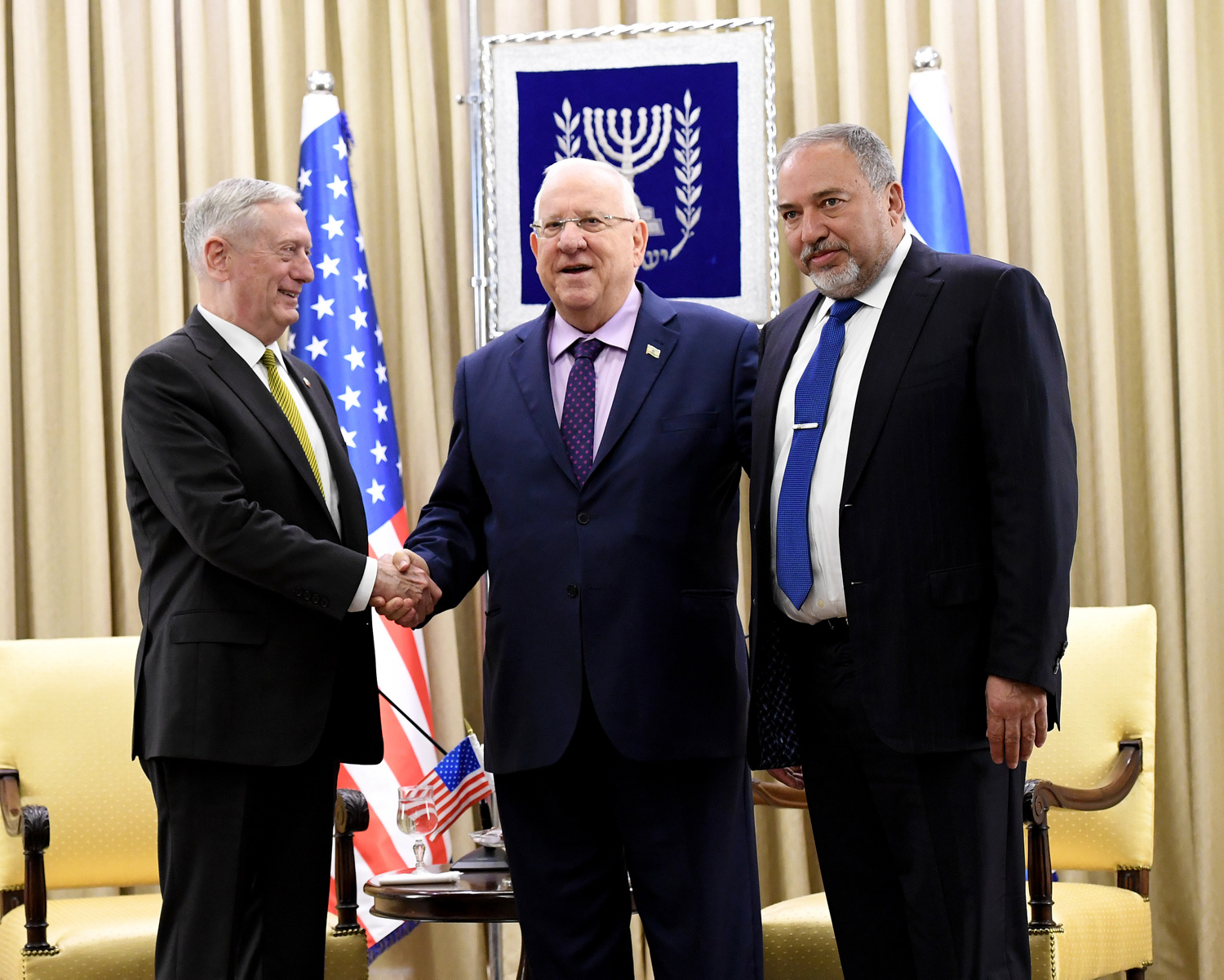 DSC_2865Press